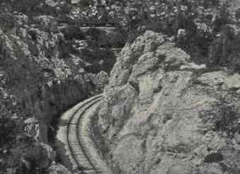 Lokalbahn Mori–Arco–Riva, wahrscheinlich in der Nähe des Lago di Loppio.